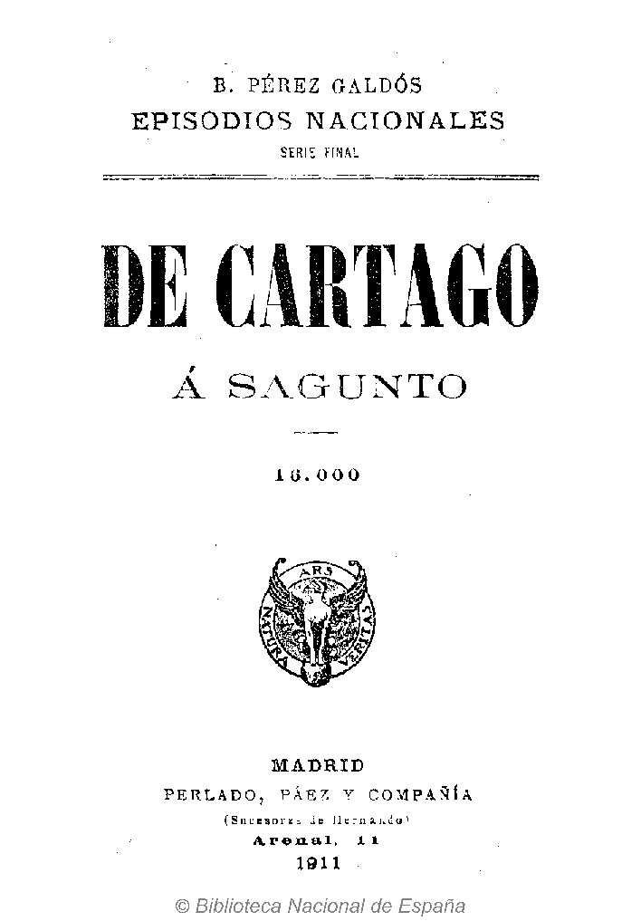 De Cartago a Sagunto Autor: Pérez Galdós, Benito (1843-1920) Fecha: 1911 Datos de edición: Madrid, Perlado, Páez y Cía (Sucesores de Hernando)